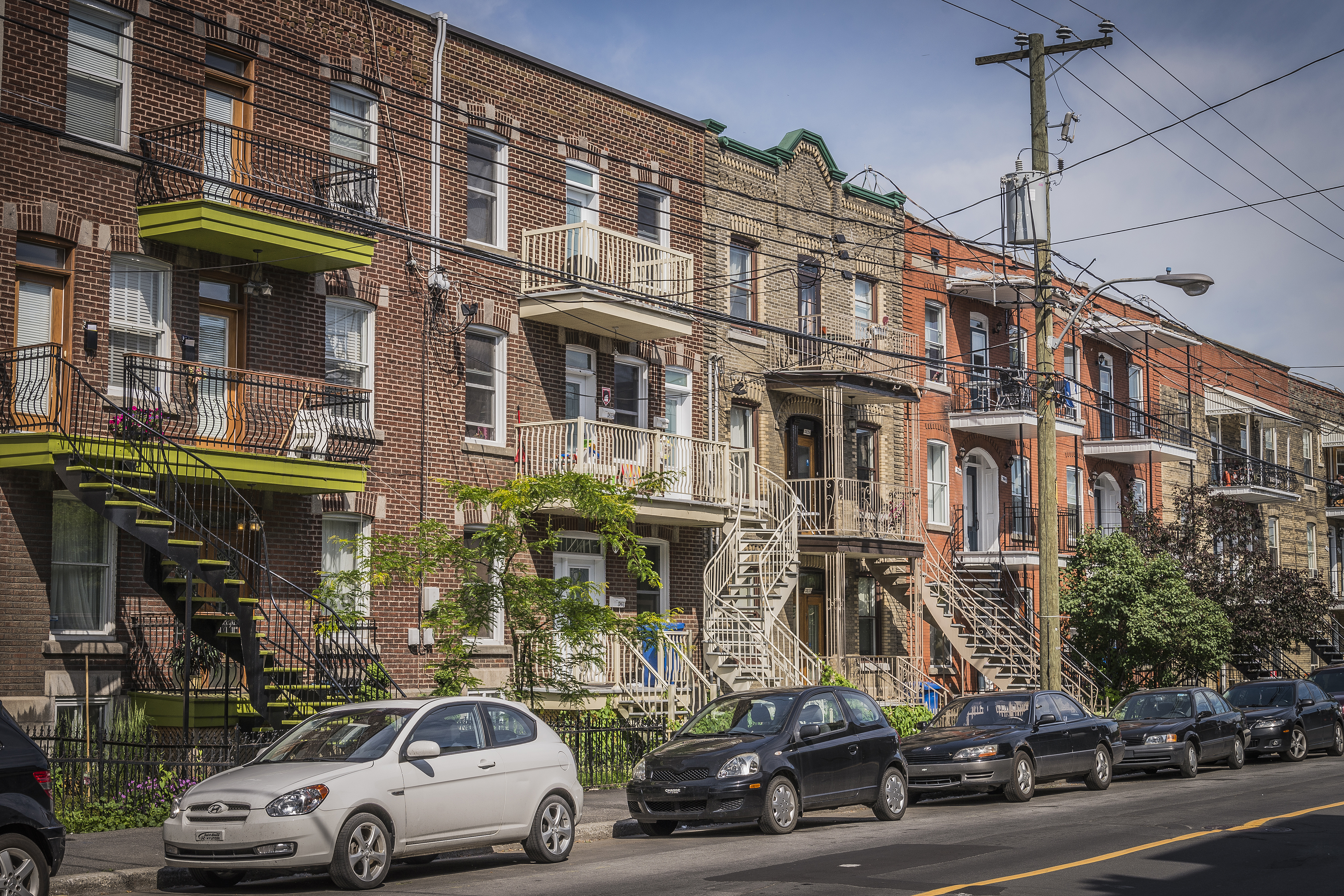 Au centre : 3857 boulevard LaSalle, Verdun, Montréal